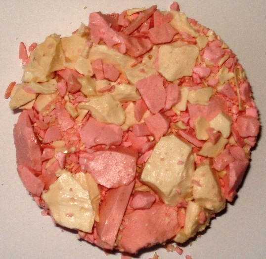 Tuerkischer Honig ("Nougat") vom Block abgeschlagene & portionierte Stücke